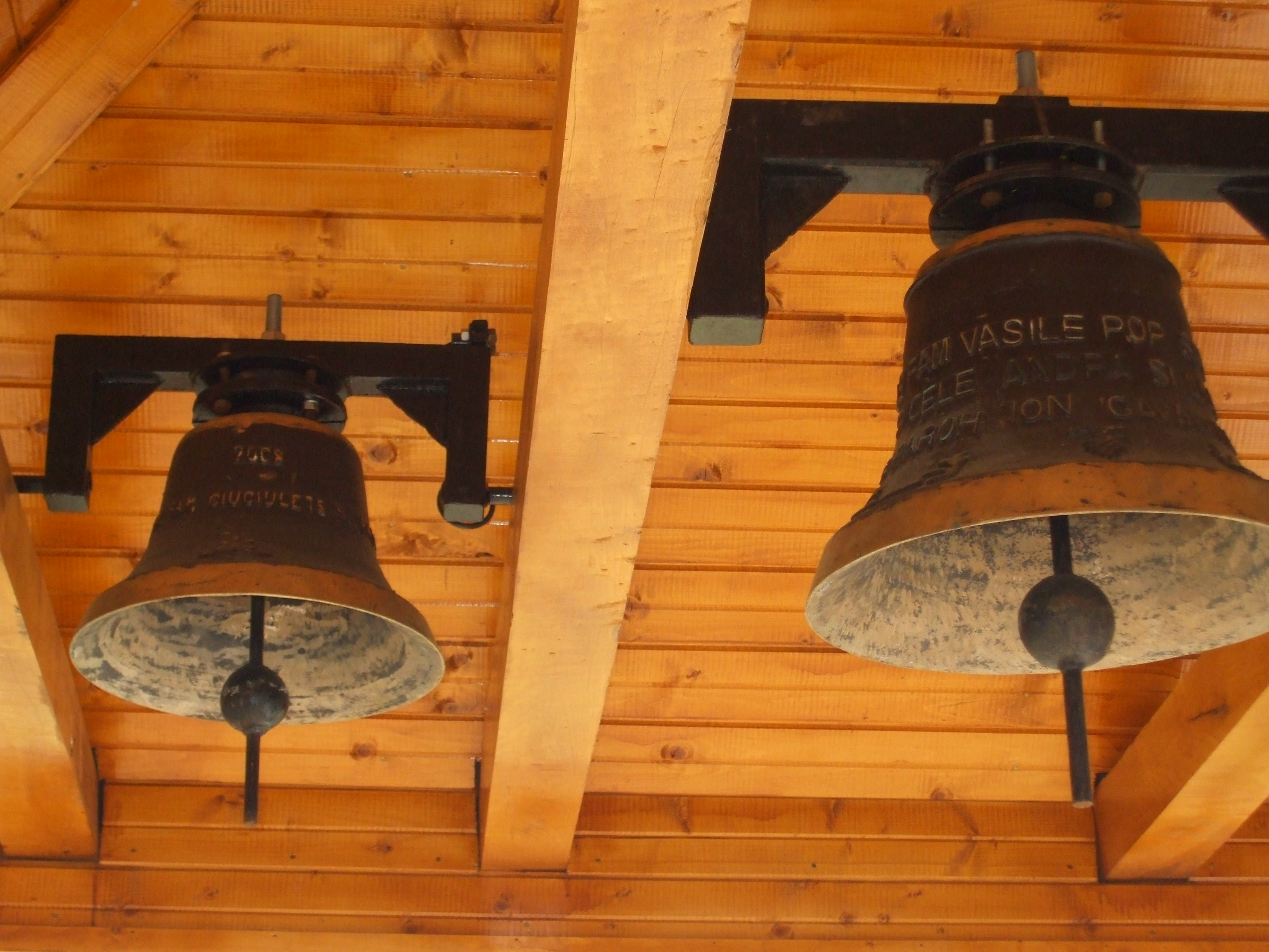 1.5 MB